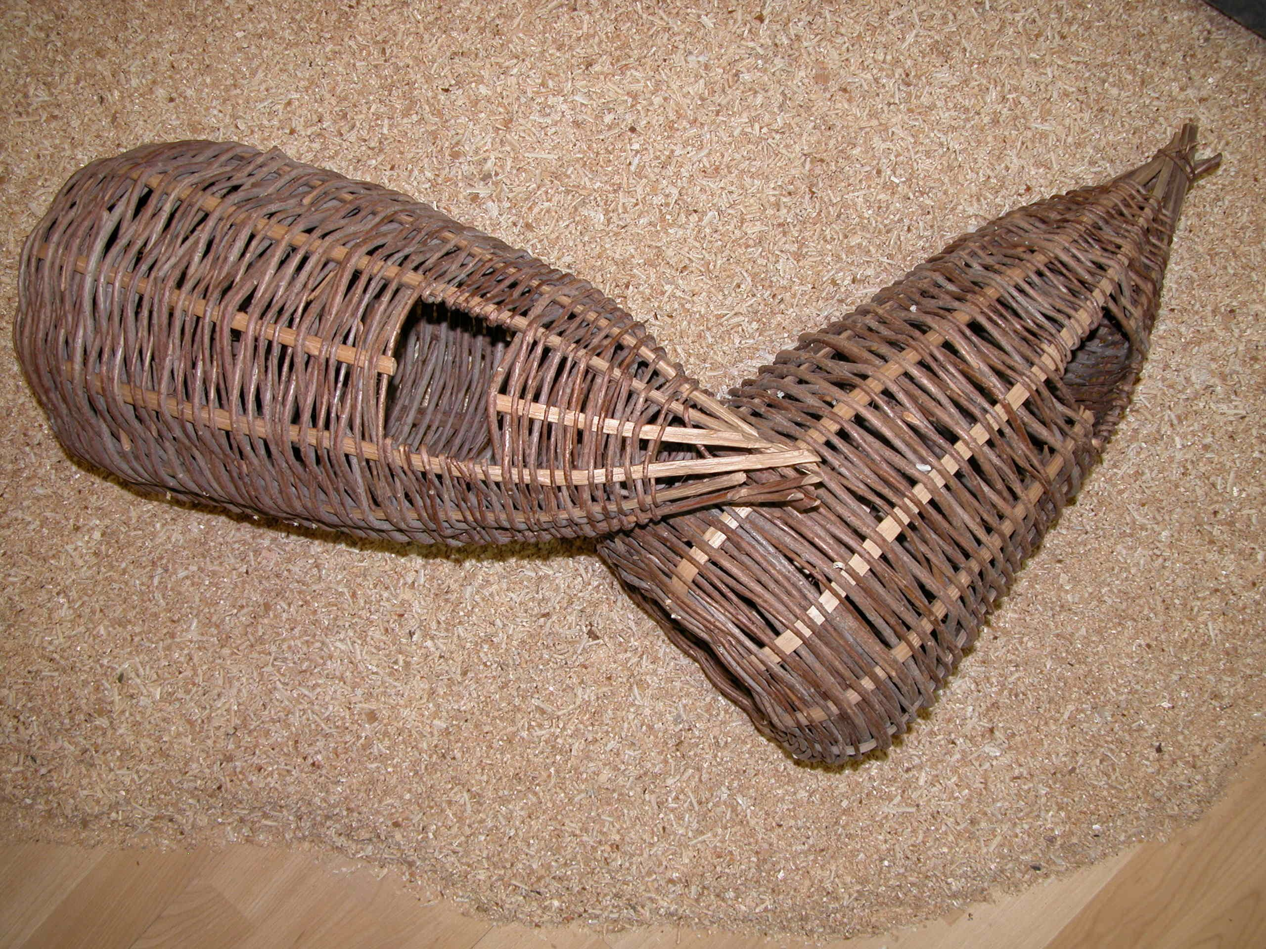 Nasa Lagunera